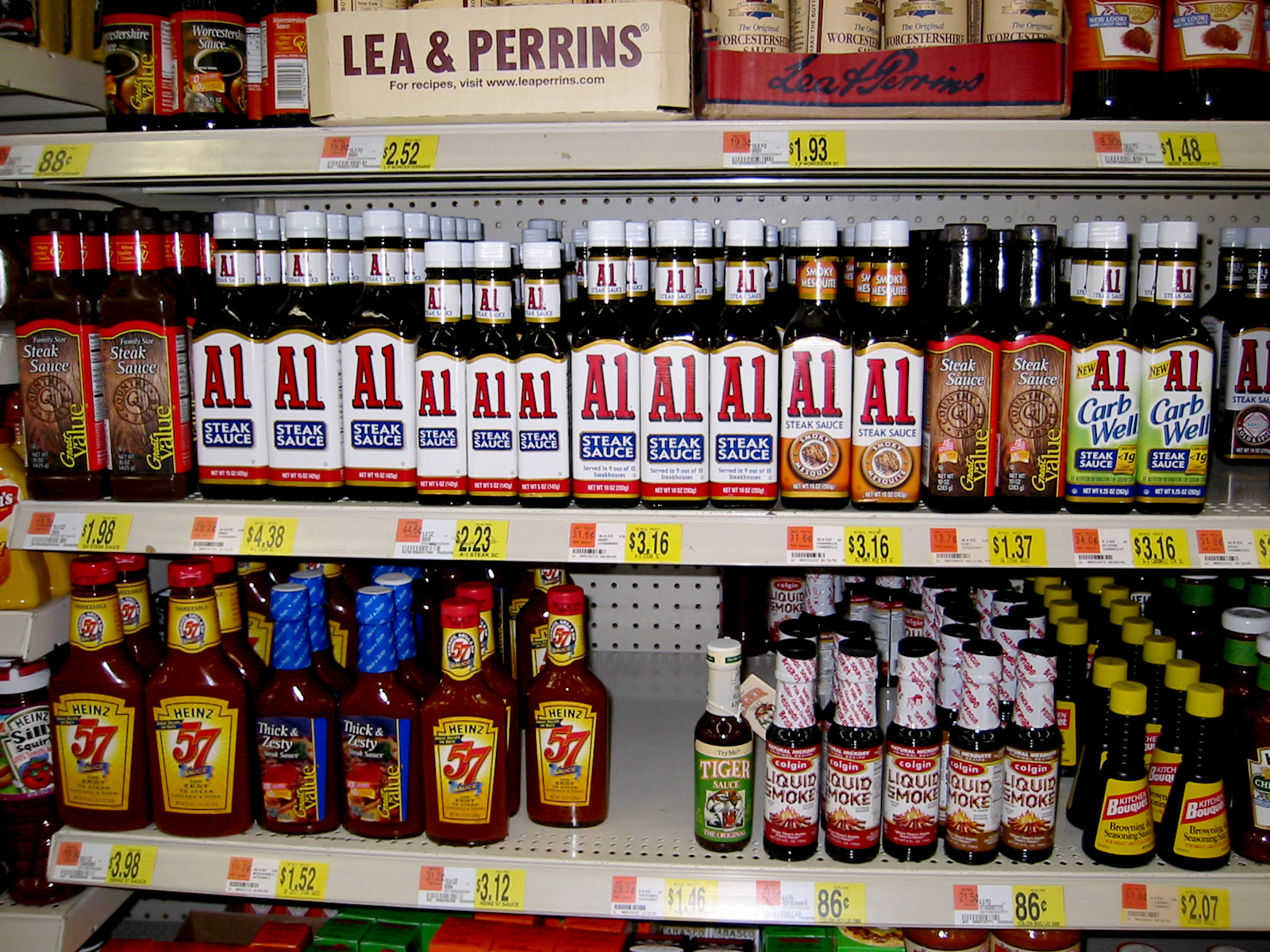 Amerikanische Steaksaucen in einer US-Wal-Mart Filiale in Florida.